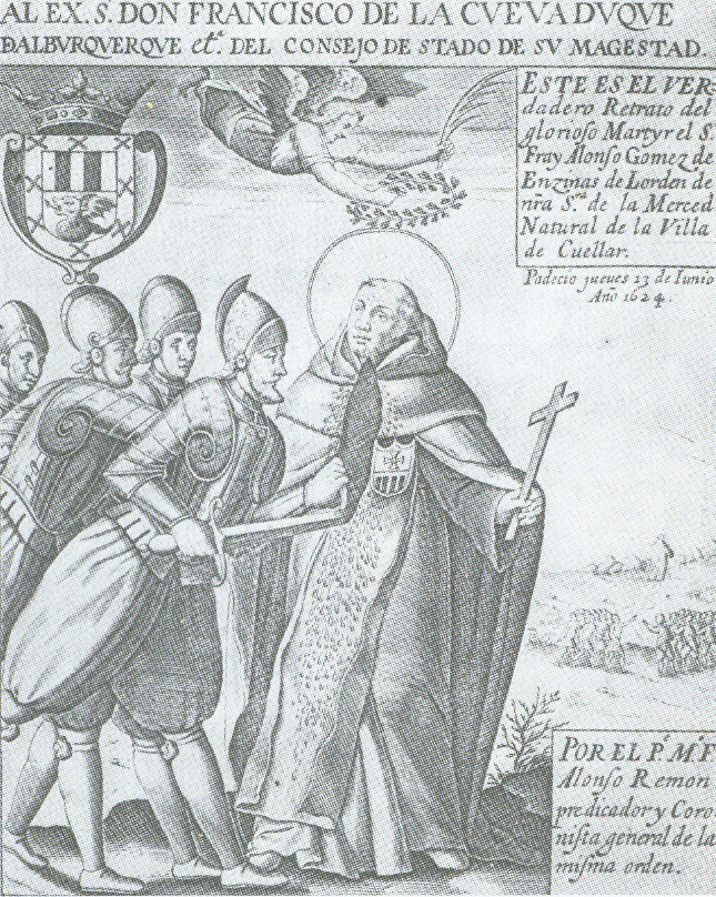 Ilustración del martirio sufrido por Alonso Gómez de Encinas (*Cuellar) en la isla de Puná.